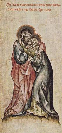 Pasionál abatyše Kunhuty